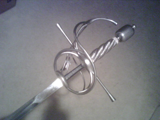 épée